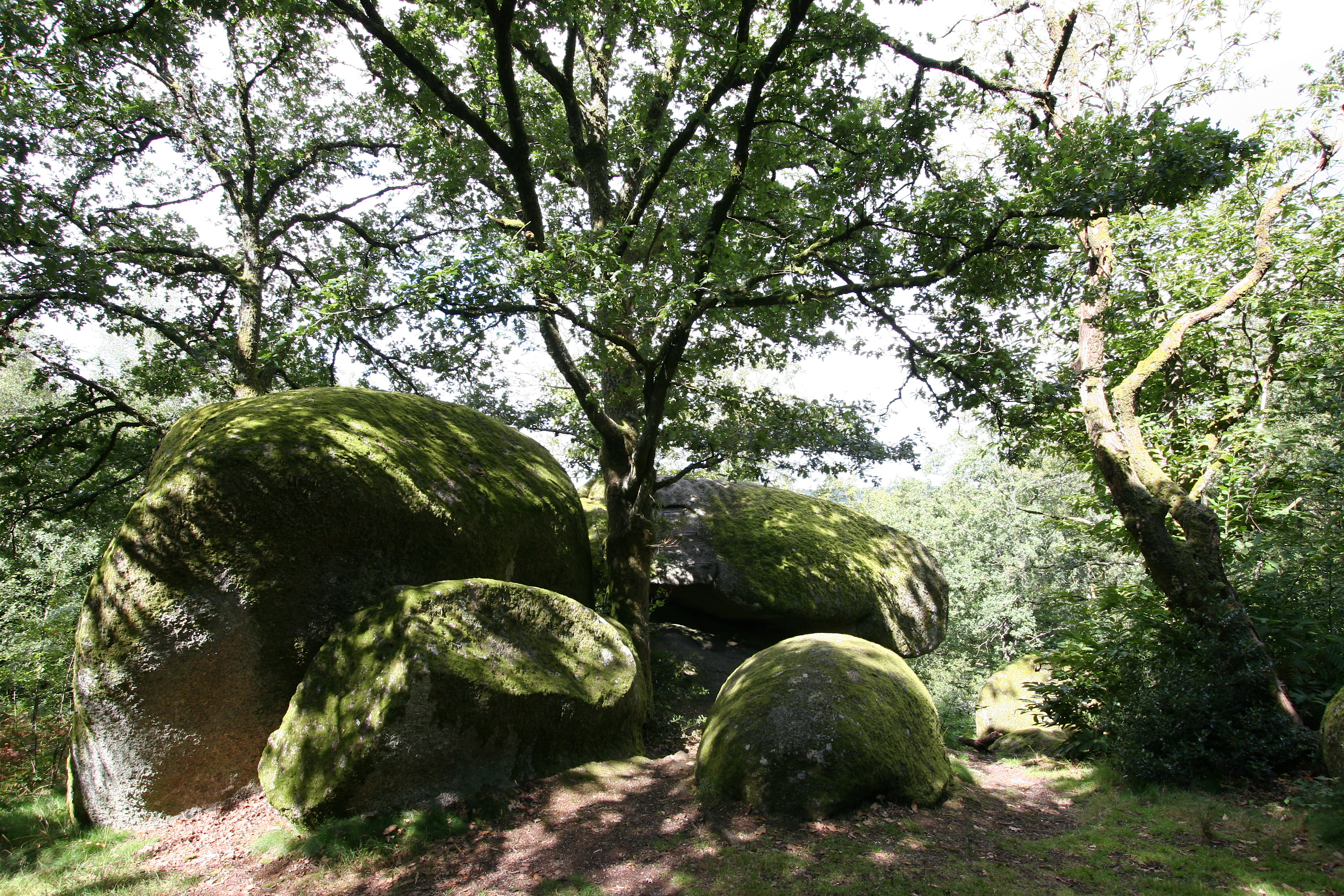 Rochers de Puychaud, en hommage à Fredéric Mistral, Blond